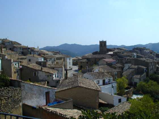 Fotografía de Orés. Autor: Juan Pablo Martínez Cortés.